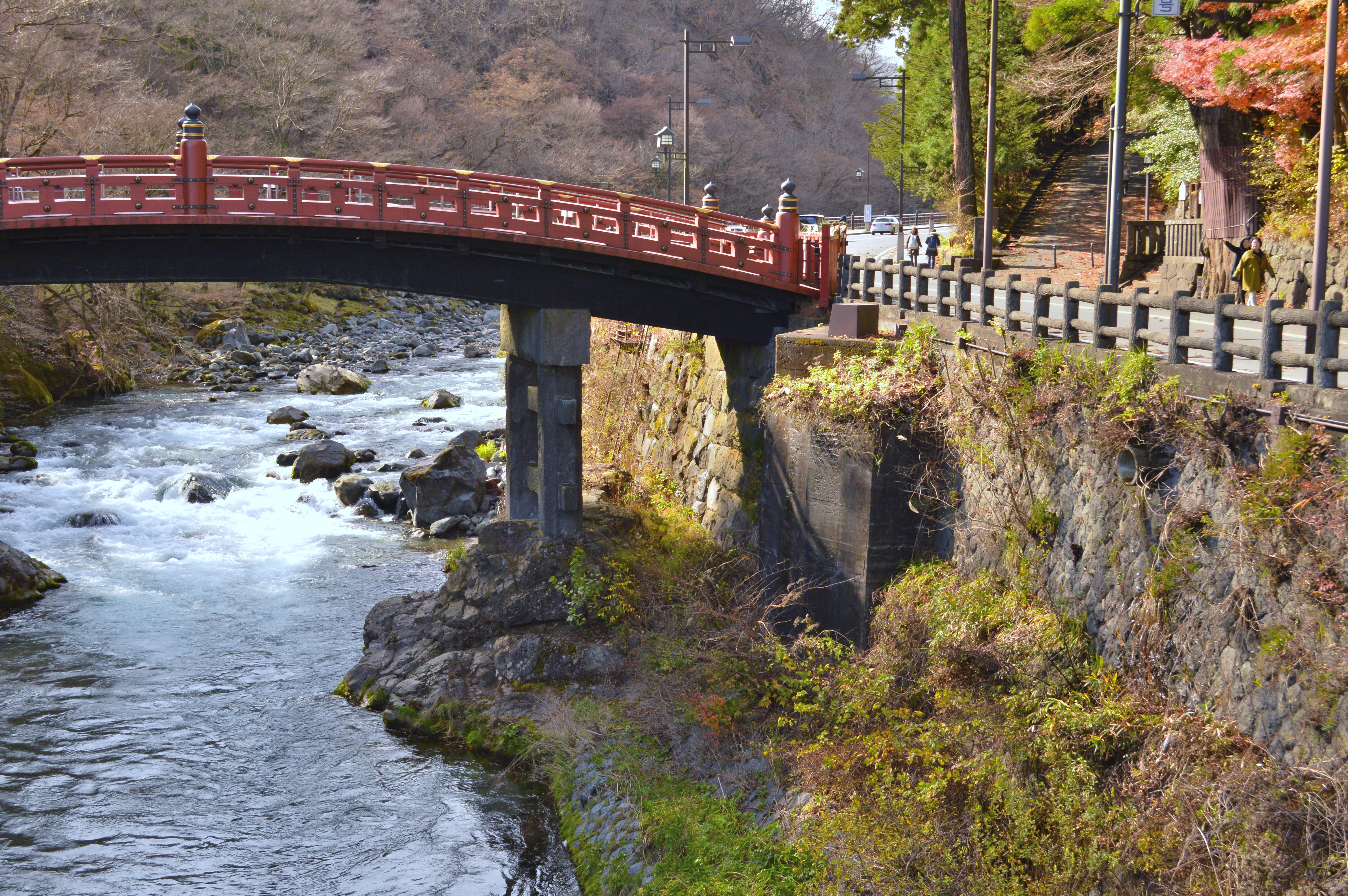 神橋 (日光市)